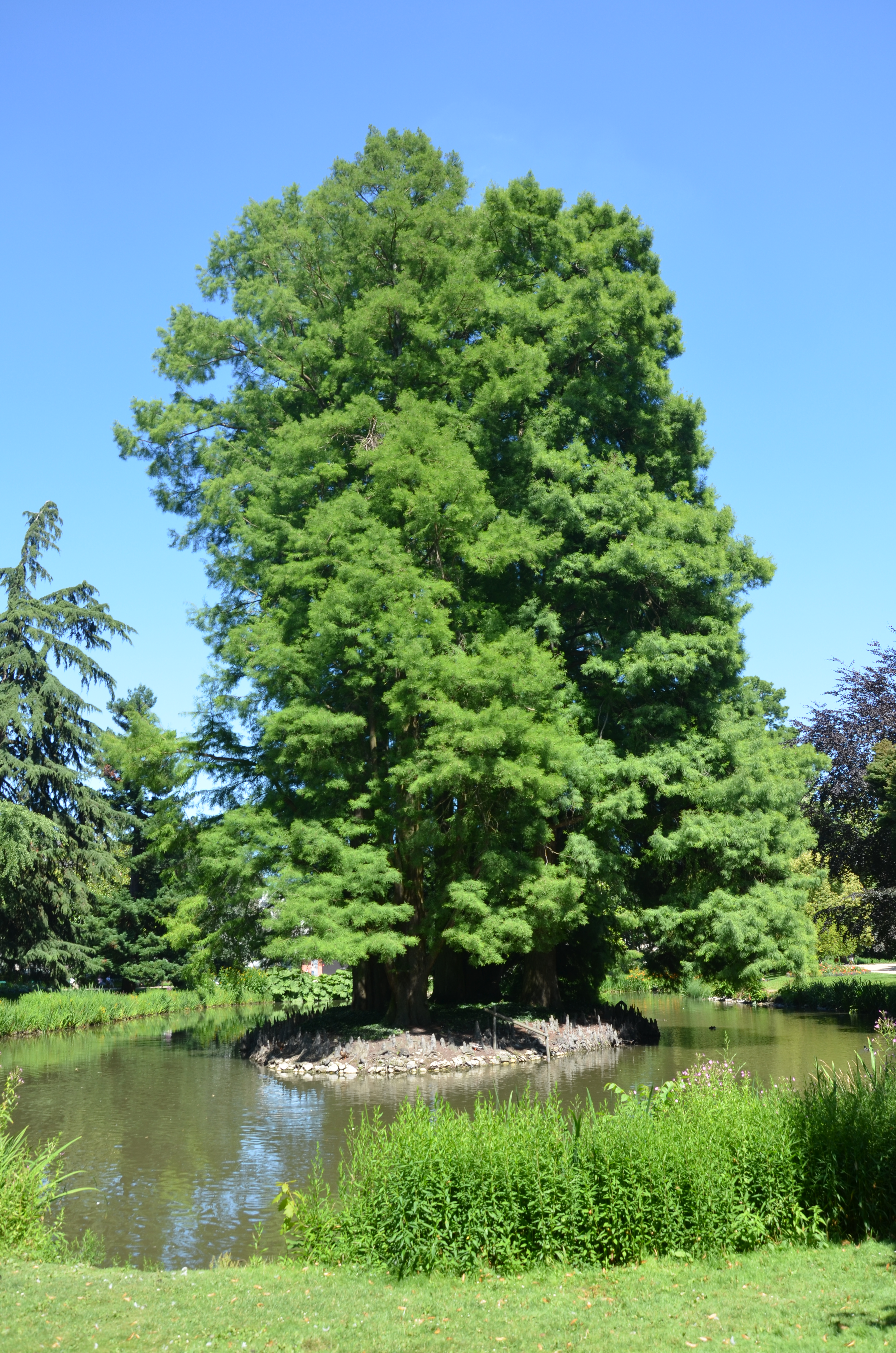 Groupe de cyprès chauves sur une petite île au sein du jardin des prébendes de Tours (France).